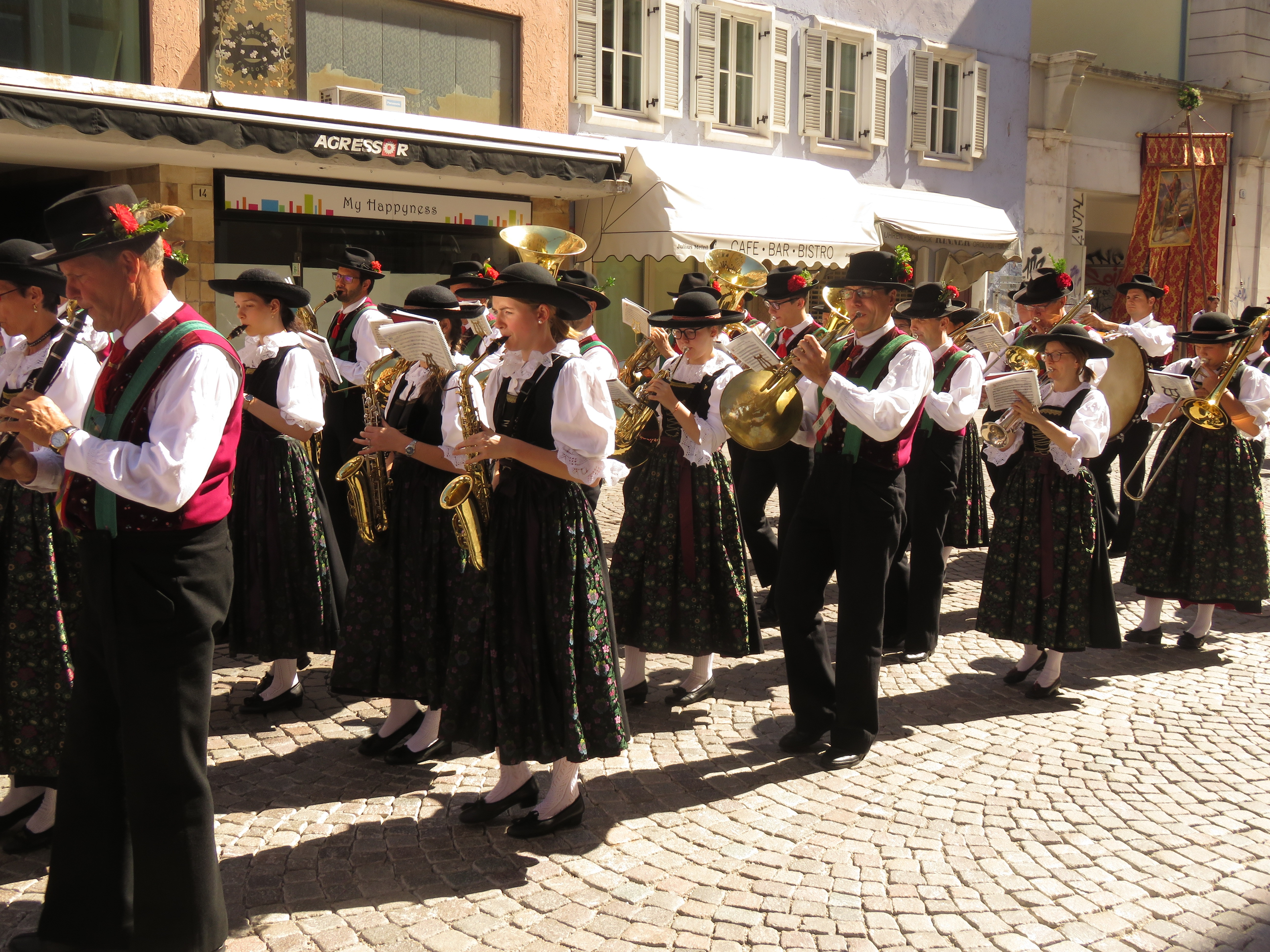 Bolzano, Domenica 10 giugno 2018. Santa Messa e tradizionale processione del Sacro Cuore di Gesù, iniziata alle ore 10 dalla cattedrale. È presente la Musikkapelle.